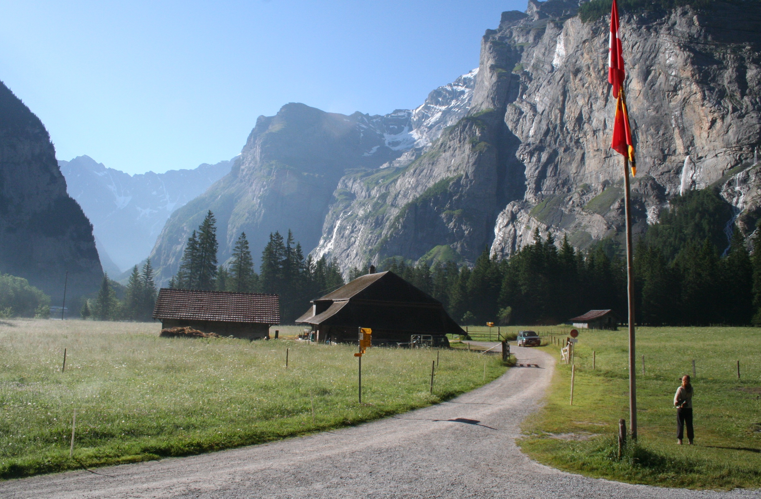 Das Gasterntal beim Waldhaus; rechts Shannii Rose